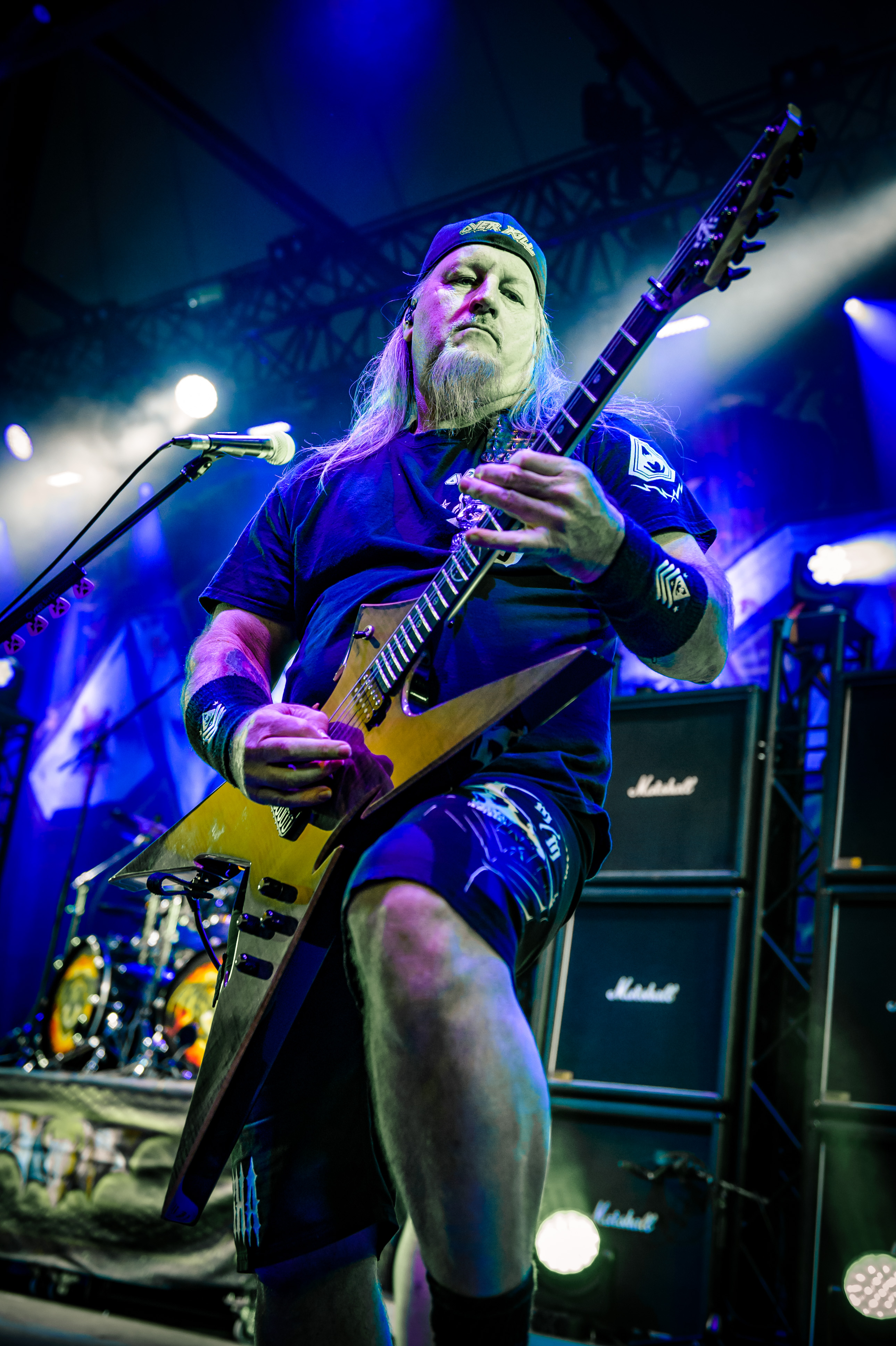 'Rock Hard Festival 2018; Amphitheater Gelsenkirchen': 'Overkill'